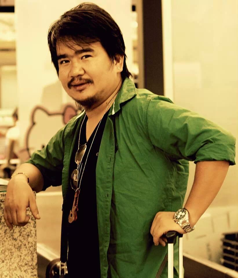 Wilson Bikram Rai